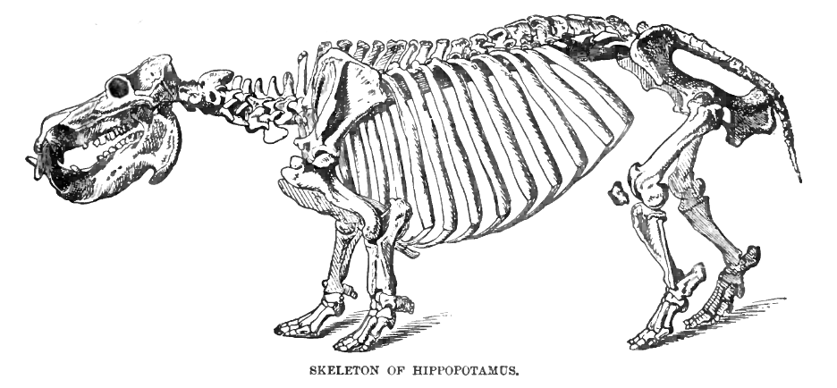 Hippopotamus skeleton